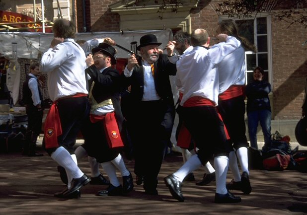 Die Sallyport Schwerttänzer beim Aufführen des Rapper-Kettenschwerttanzes (siehe Rapper Sword) in Juni 1999. Dieser Verein kommt aus Newcastle upon Tyne, mitten in der Heimat des Rapper-Tanzes. Inmitten des Bildes gibt es zwei »Tommies«, komische Charakter die zum Rapper-Tanz wesentlich sind.